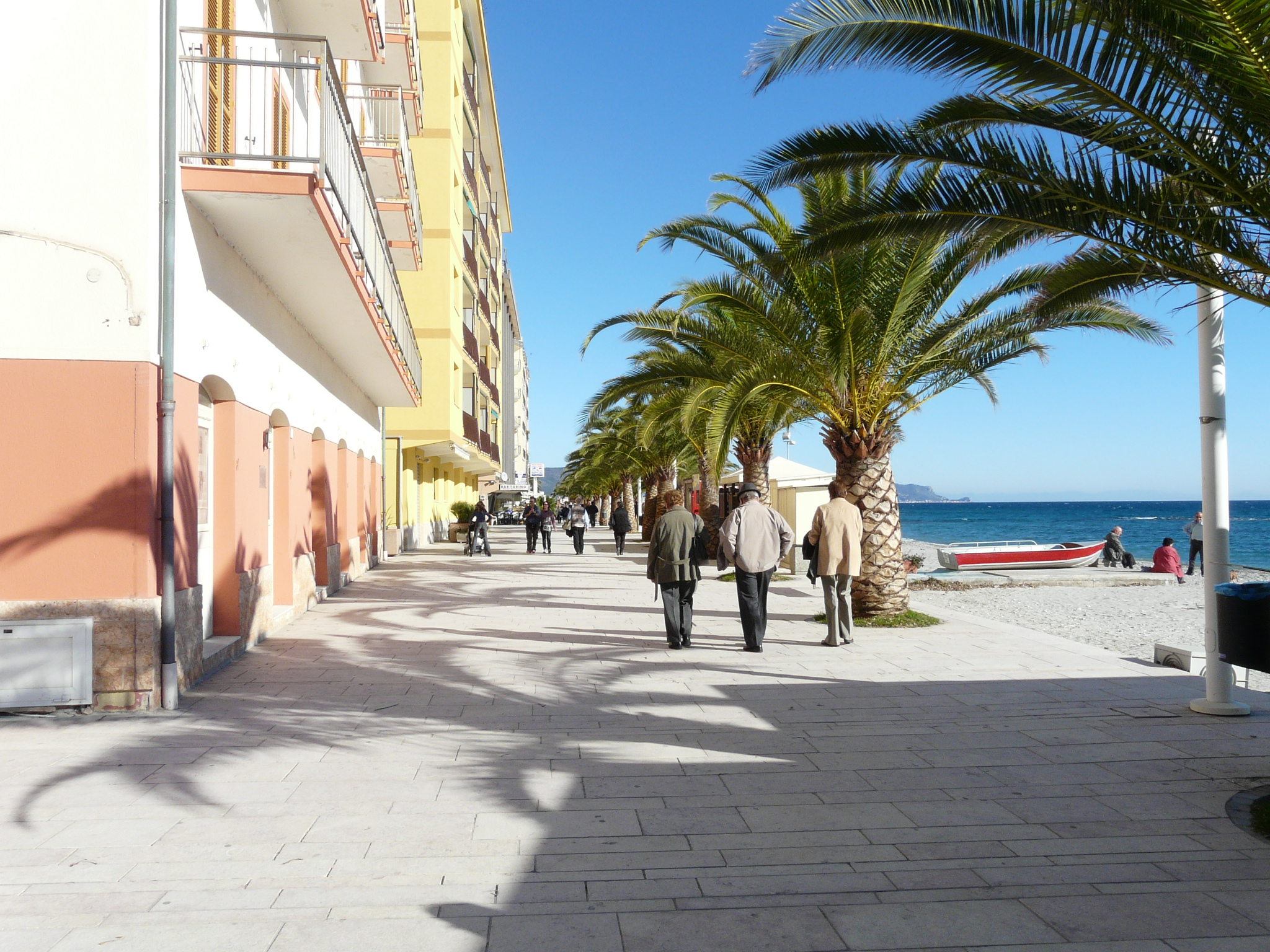 Lungomare di Borghetto Santo Spirito, Liguria, Italia